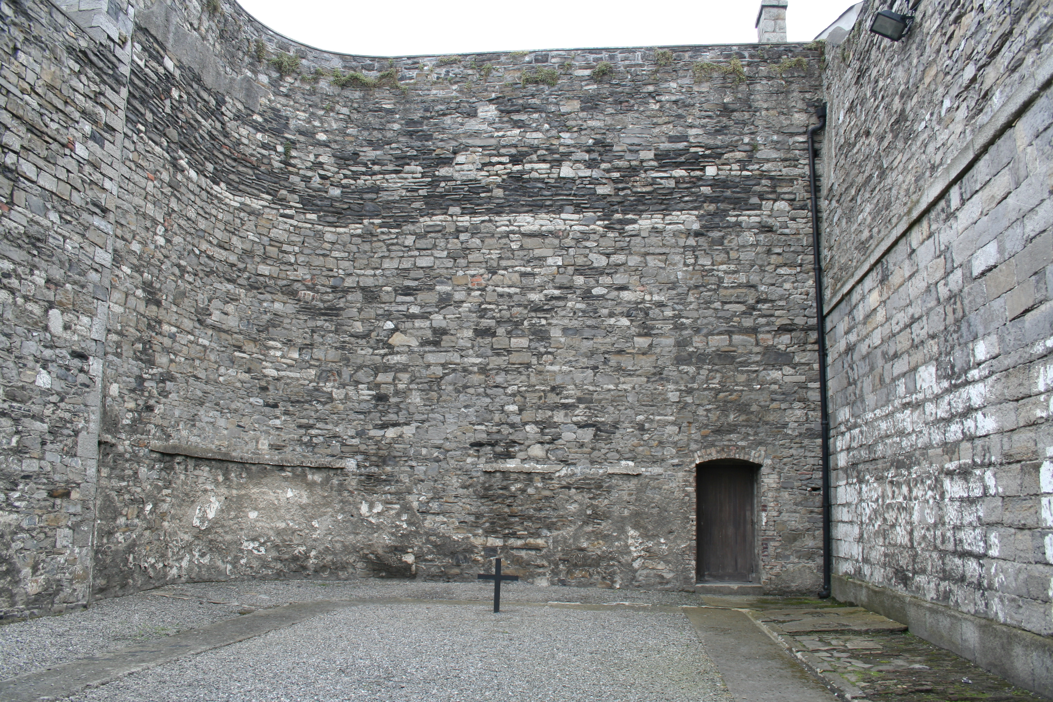 Cárcel de Kilmainham, DublínCárcel de Kilmainham